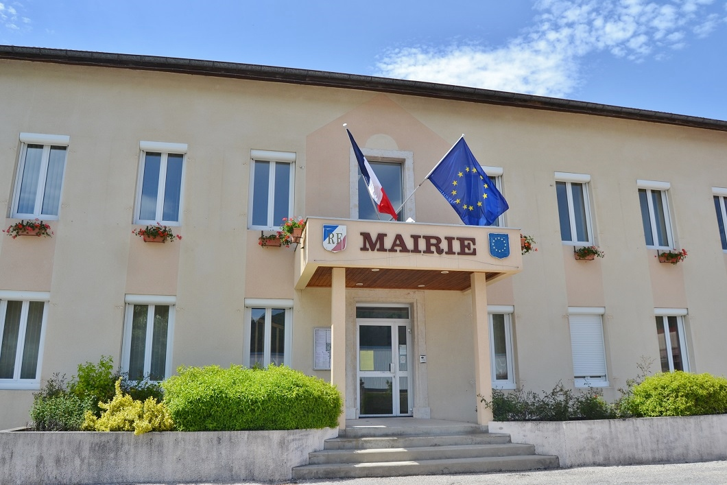 la Mairie